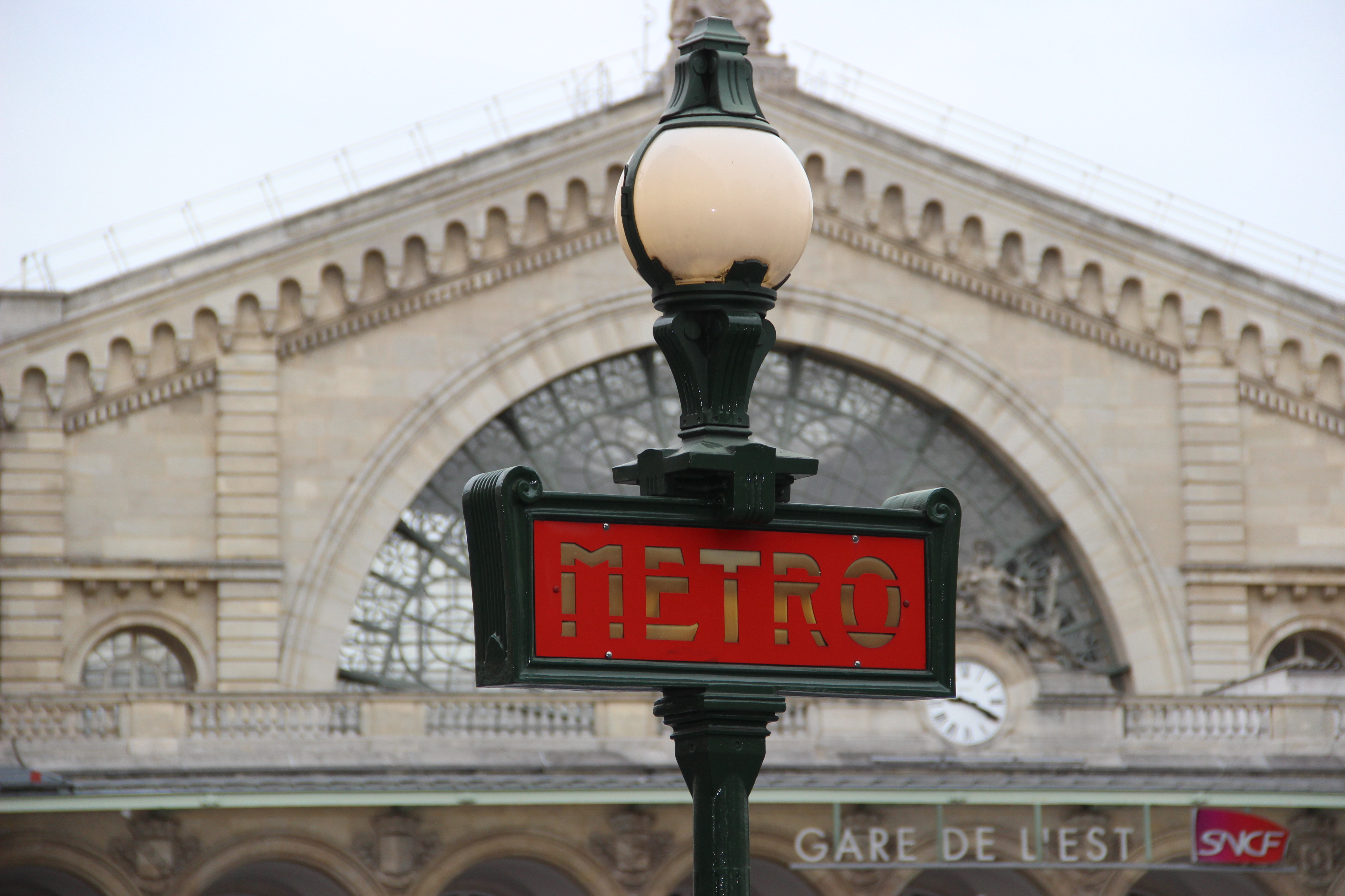 Entrée de la station face à la Gare de l'Est